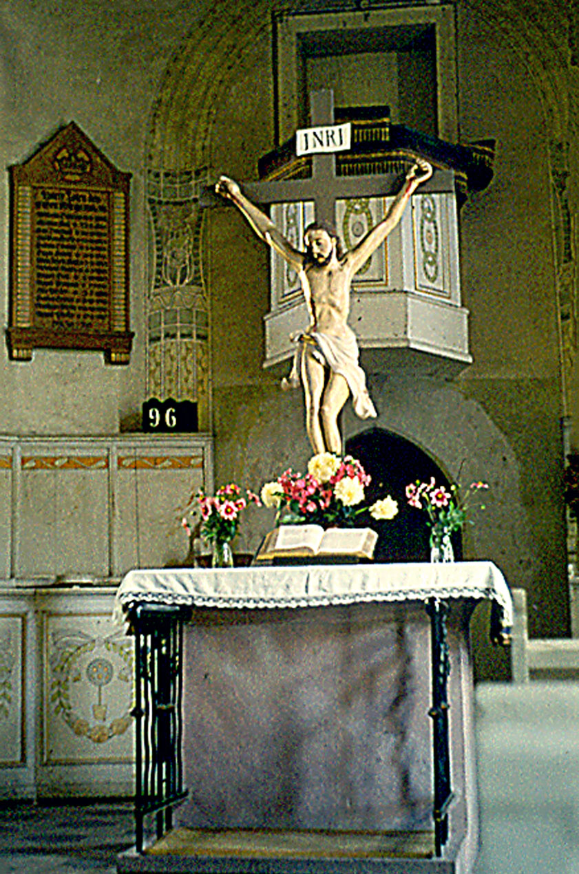 Kruzifix in der Dorfkirche Bernbach bei Bad Herrenalb im Jahr 1962